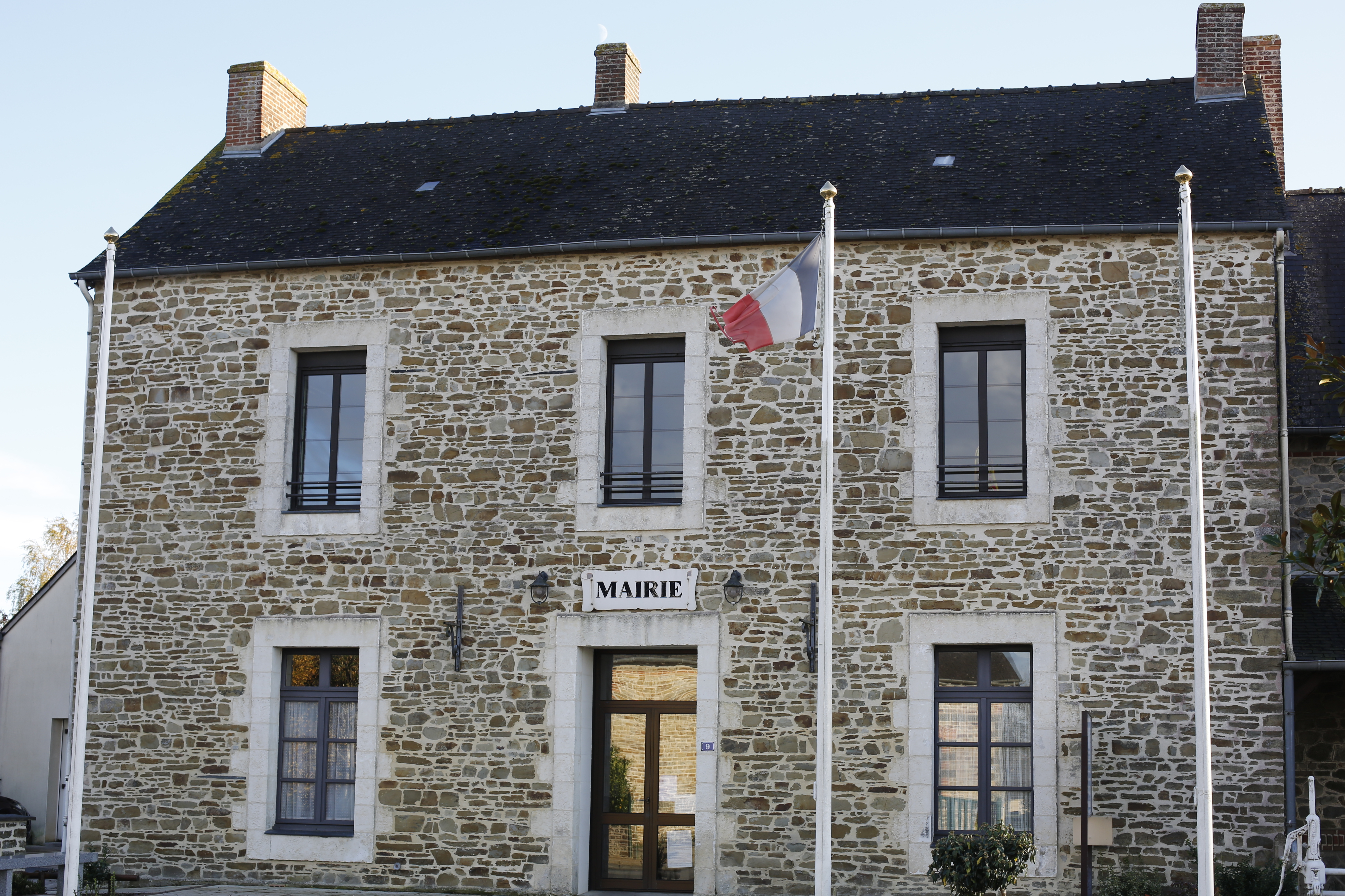 Mairie de Tresbœuf.